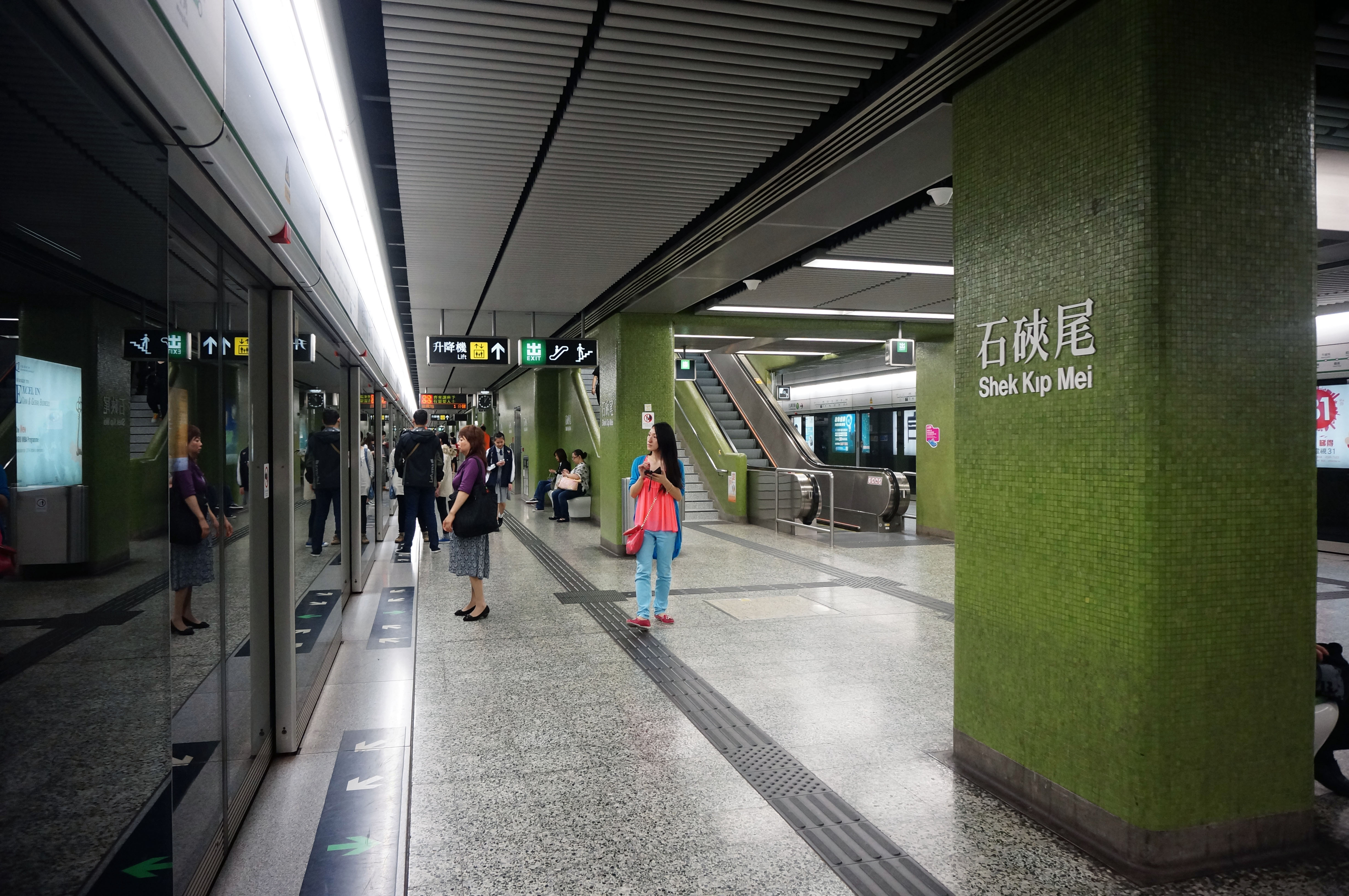 港鐵石硤尾站月台